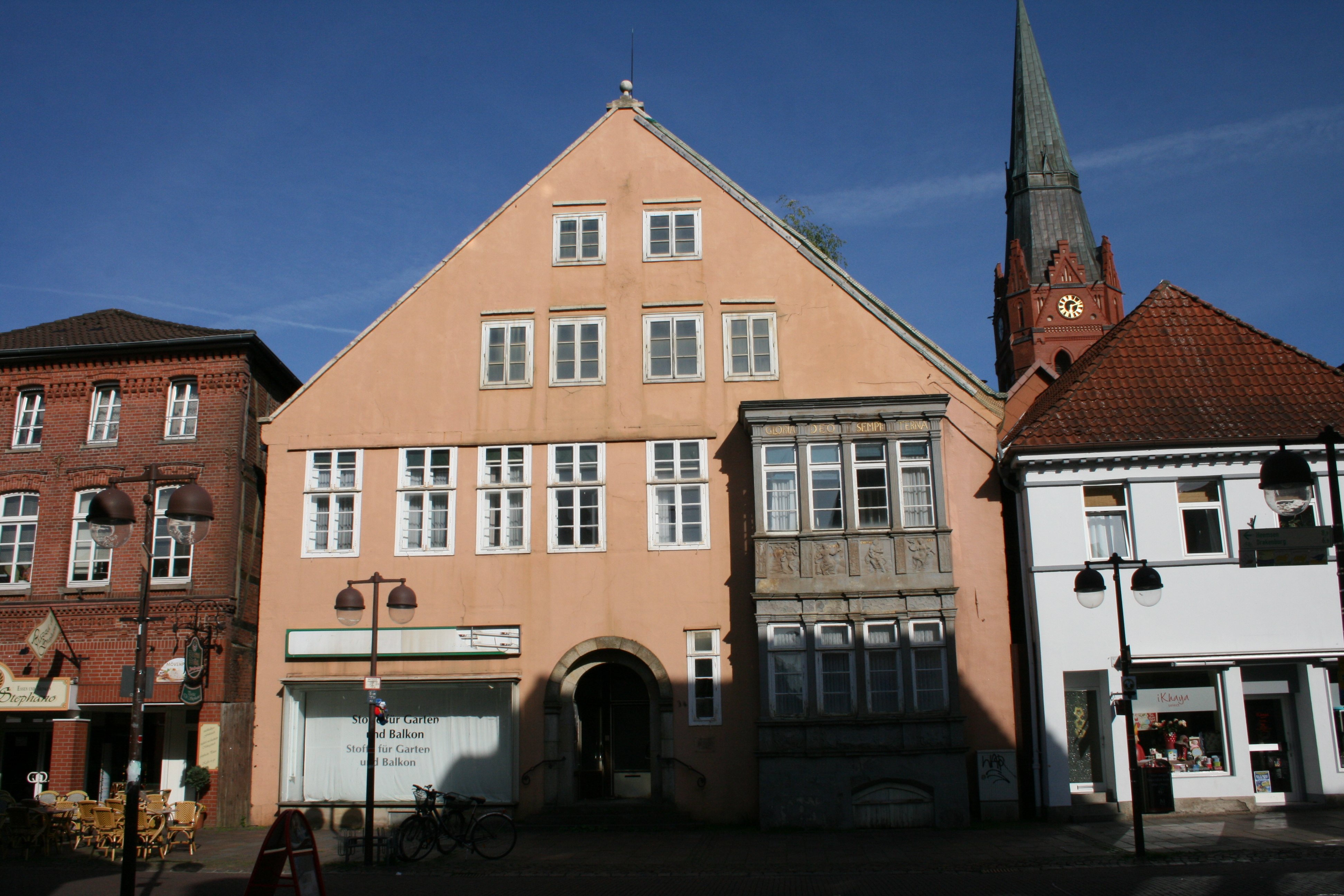 Nienburg/Weser Baudenkmal Lange Straße 34, Steinhaus im Stil der Weserrenaissance